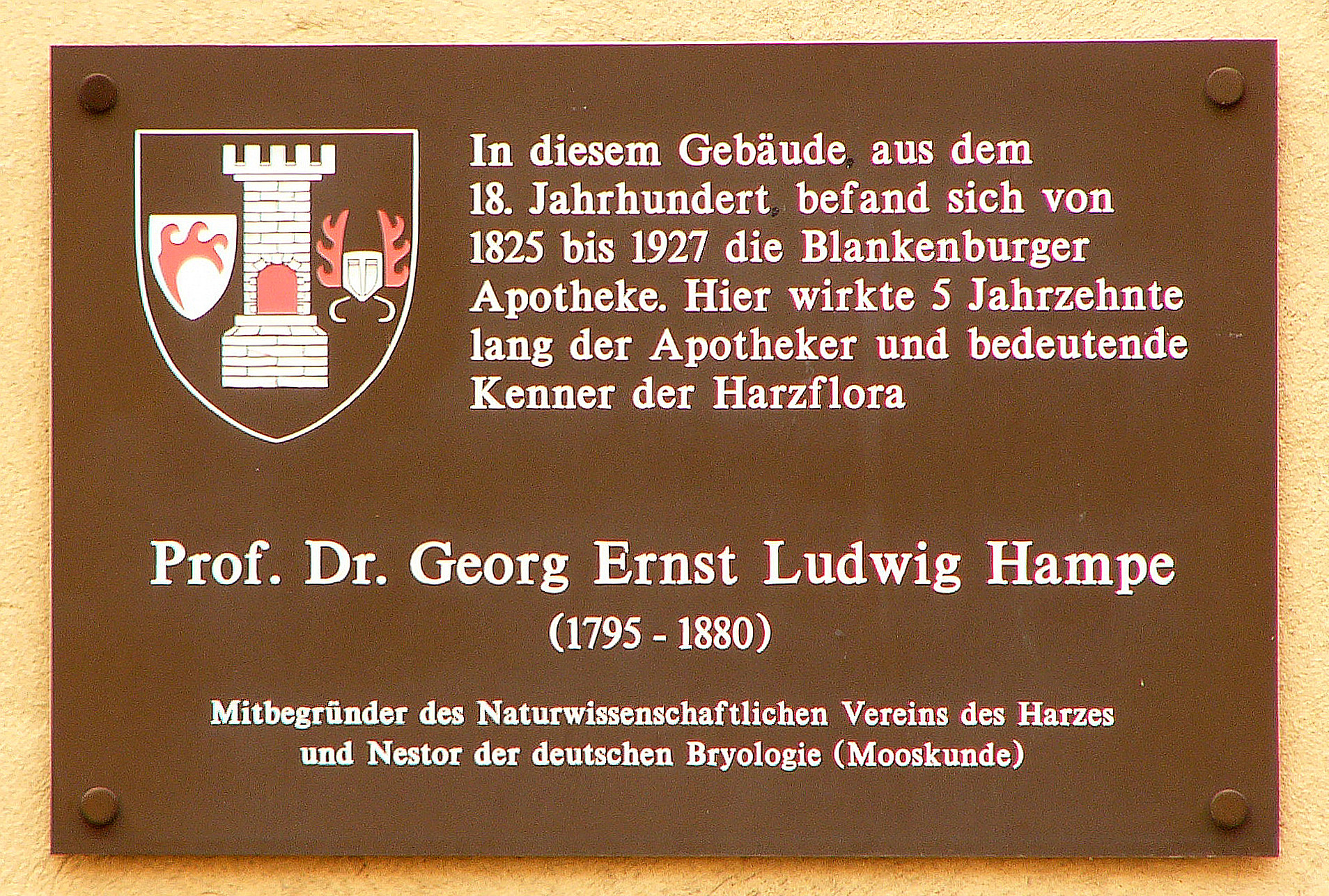 Gedenktafel für Georg Ernst Ludwig Hampe am Haus Nr. 31, Marktstraße, Blankenburg (Harz).